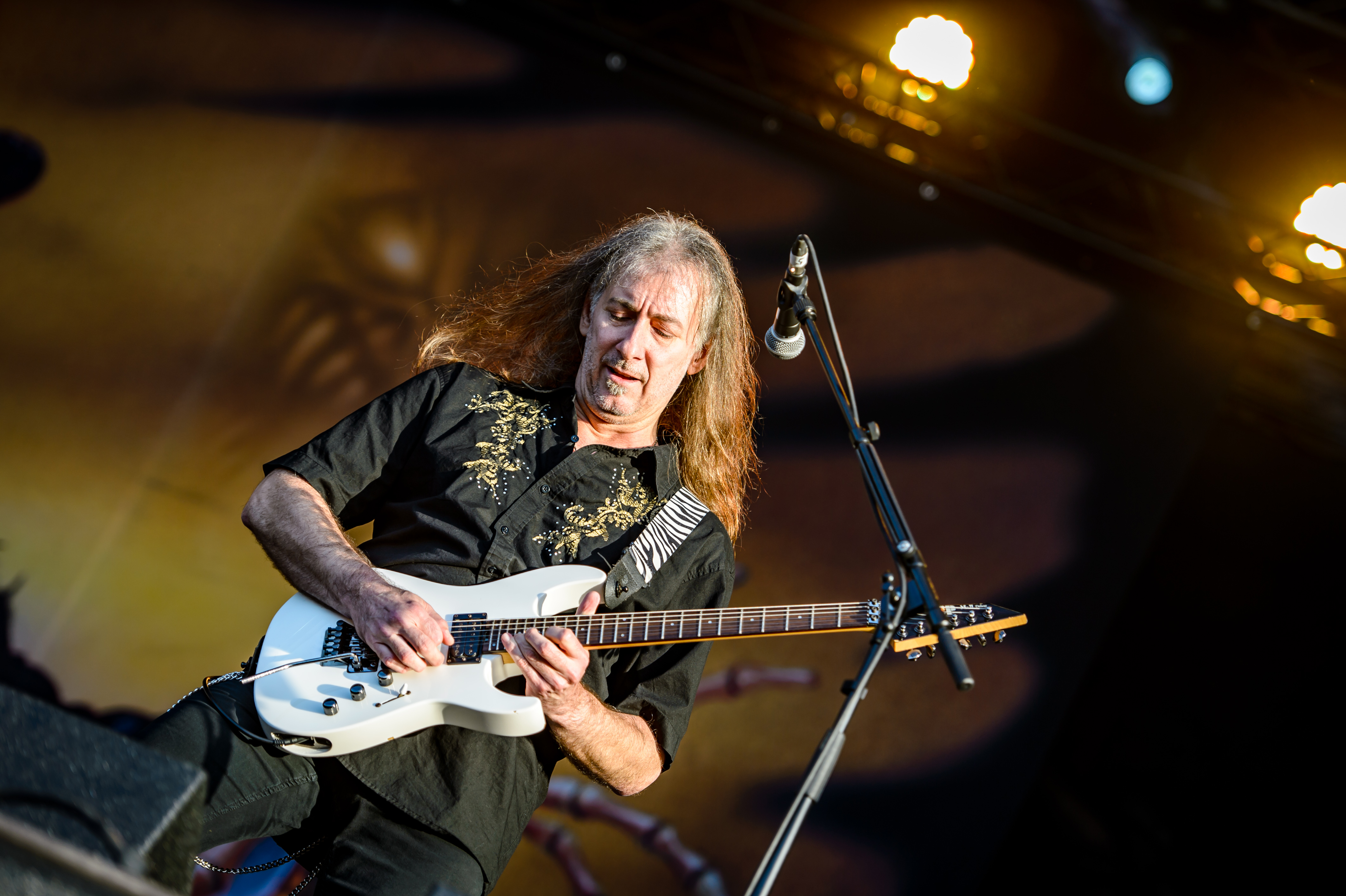 'RockHarz Open Air 2016; Ballenstedt': 'Gamma Ray'